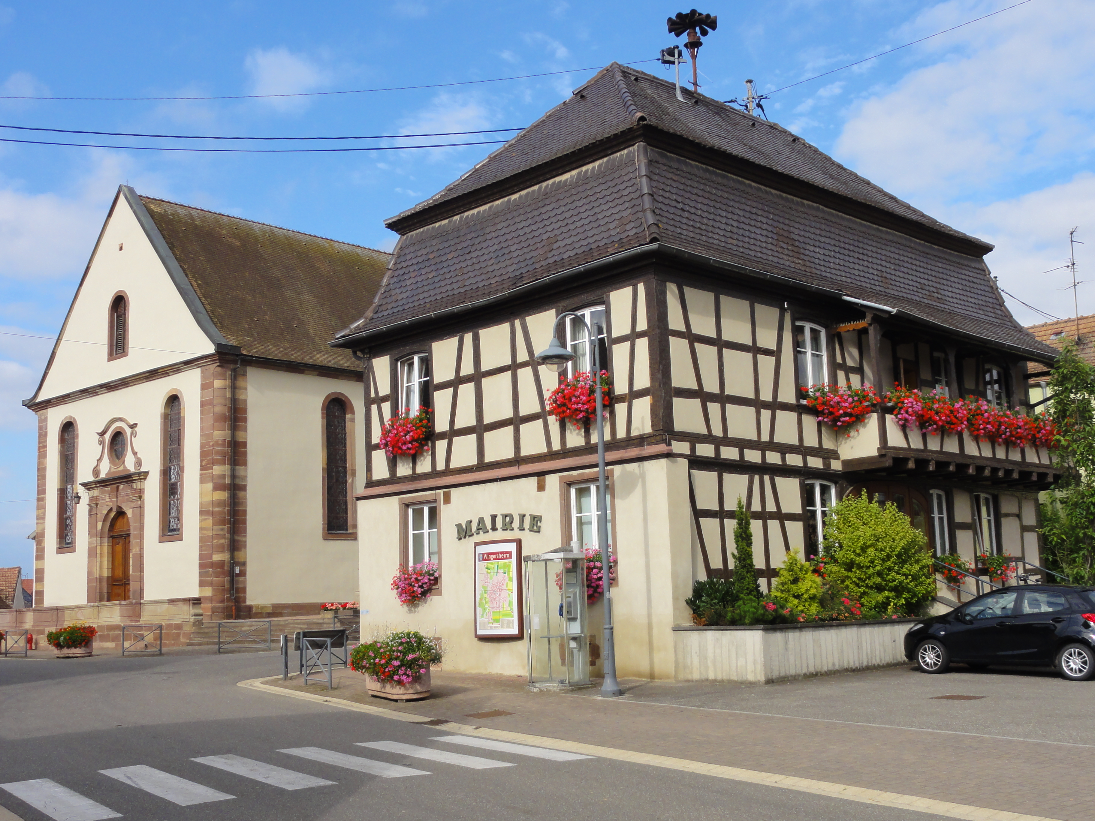 Alsace, Bas-Rhin, Wingersheim, Église Saint-Nicolas (PA00085242, IA67009255).Mairie (XVIIIe), ancienne ferme, 1 rue de la Première-Armée. .